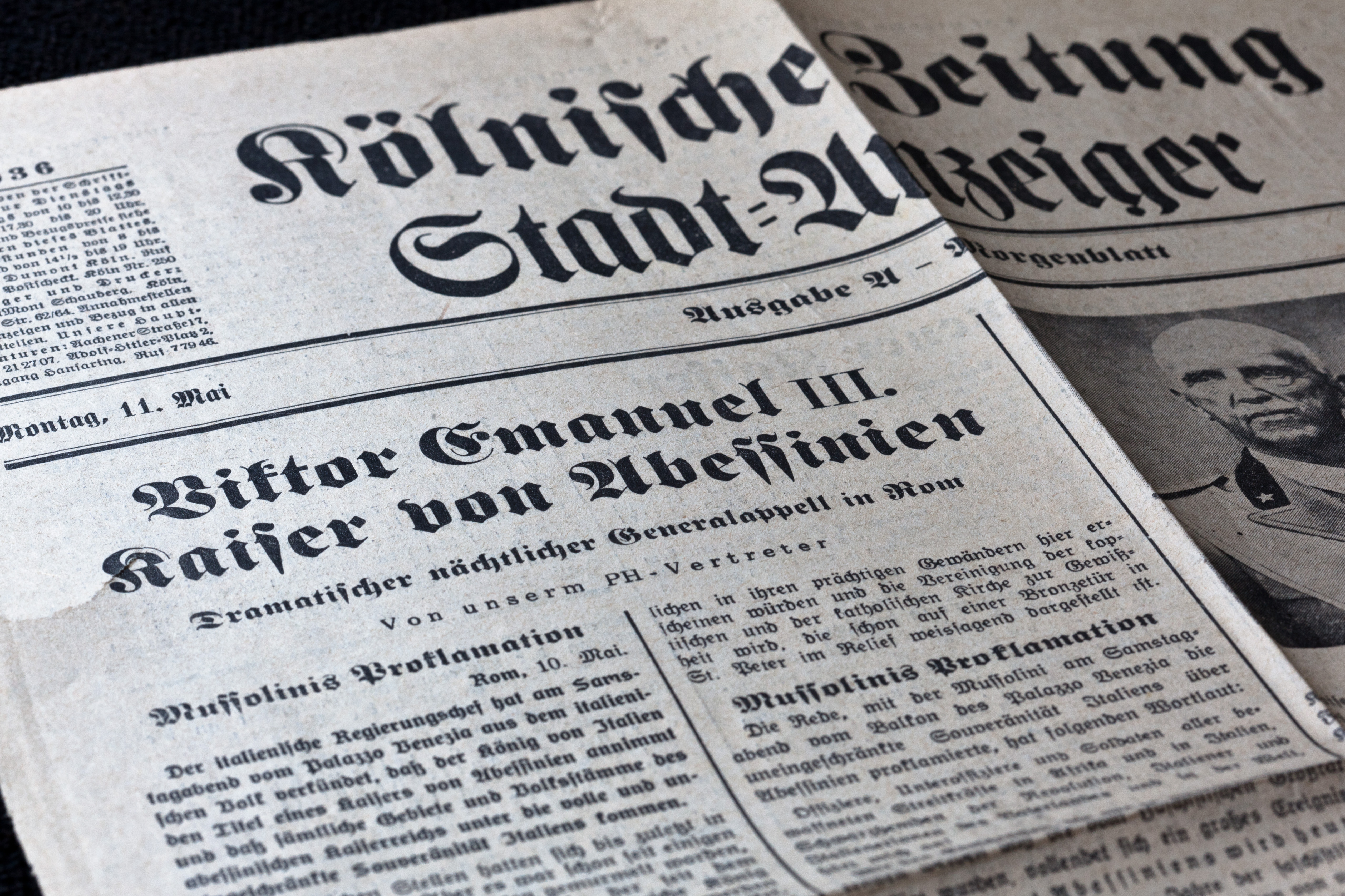 Titelblatt der lokalen Ausgabe der Kölnischen Zeitung - deswegen der Untertitel "Stadt-Anzeiger" - vom 11. Mai 1936. Im Fokus steht Mussolinis Proklamation vom 10. Mai, Abessinien zu annexieren und den italienischen König Viktor Emanuel III zum Kaiser Abessiniens zu erklären.